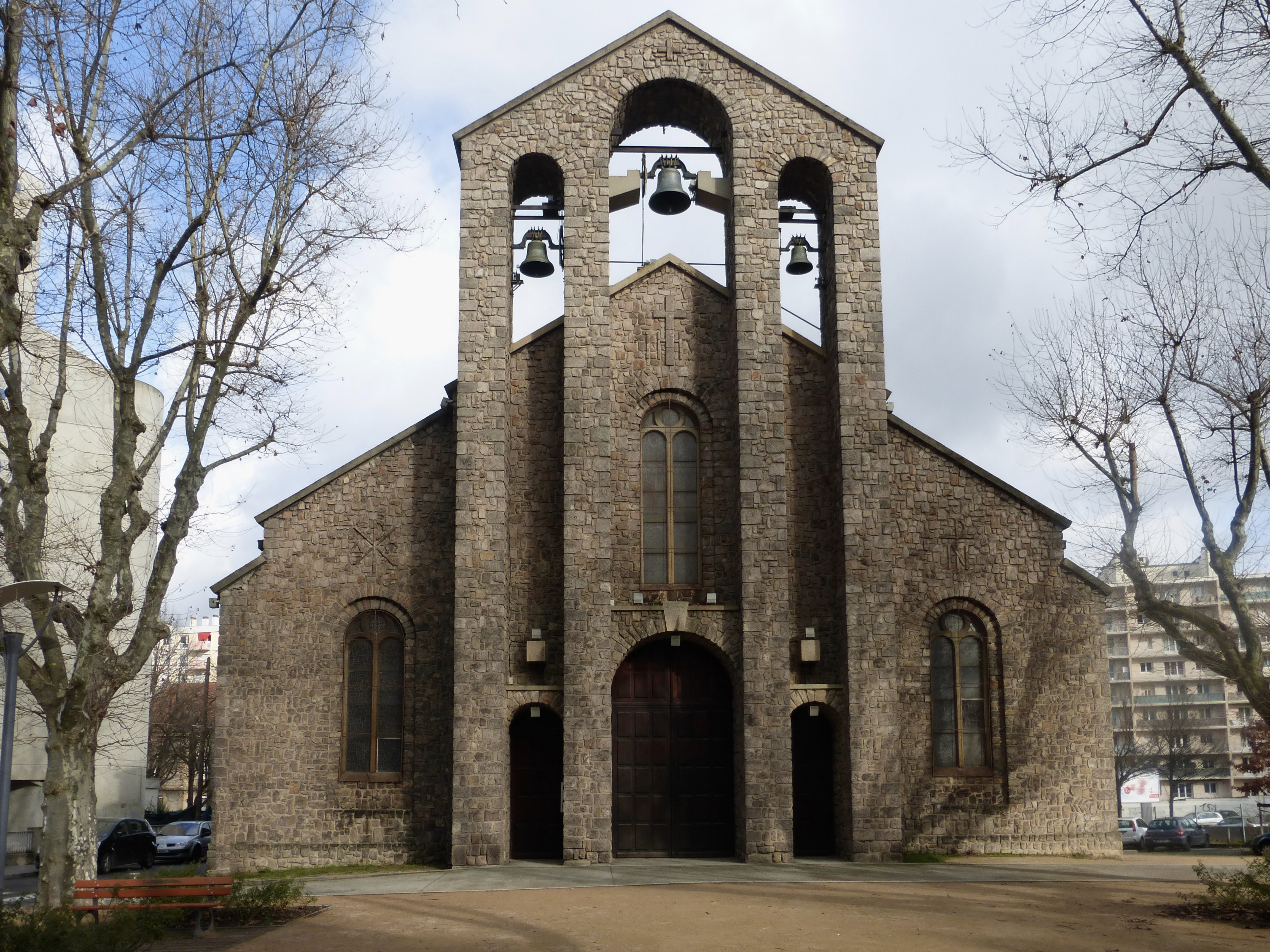 Église Saint-Pierre Saint-Paul Saint-Etienne, Loire, France 01/01/2015